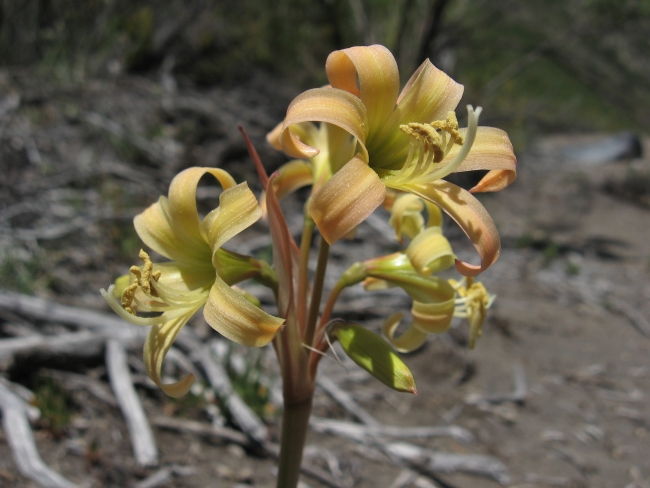 Rhodophiala montana